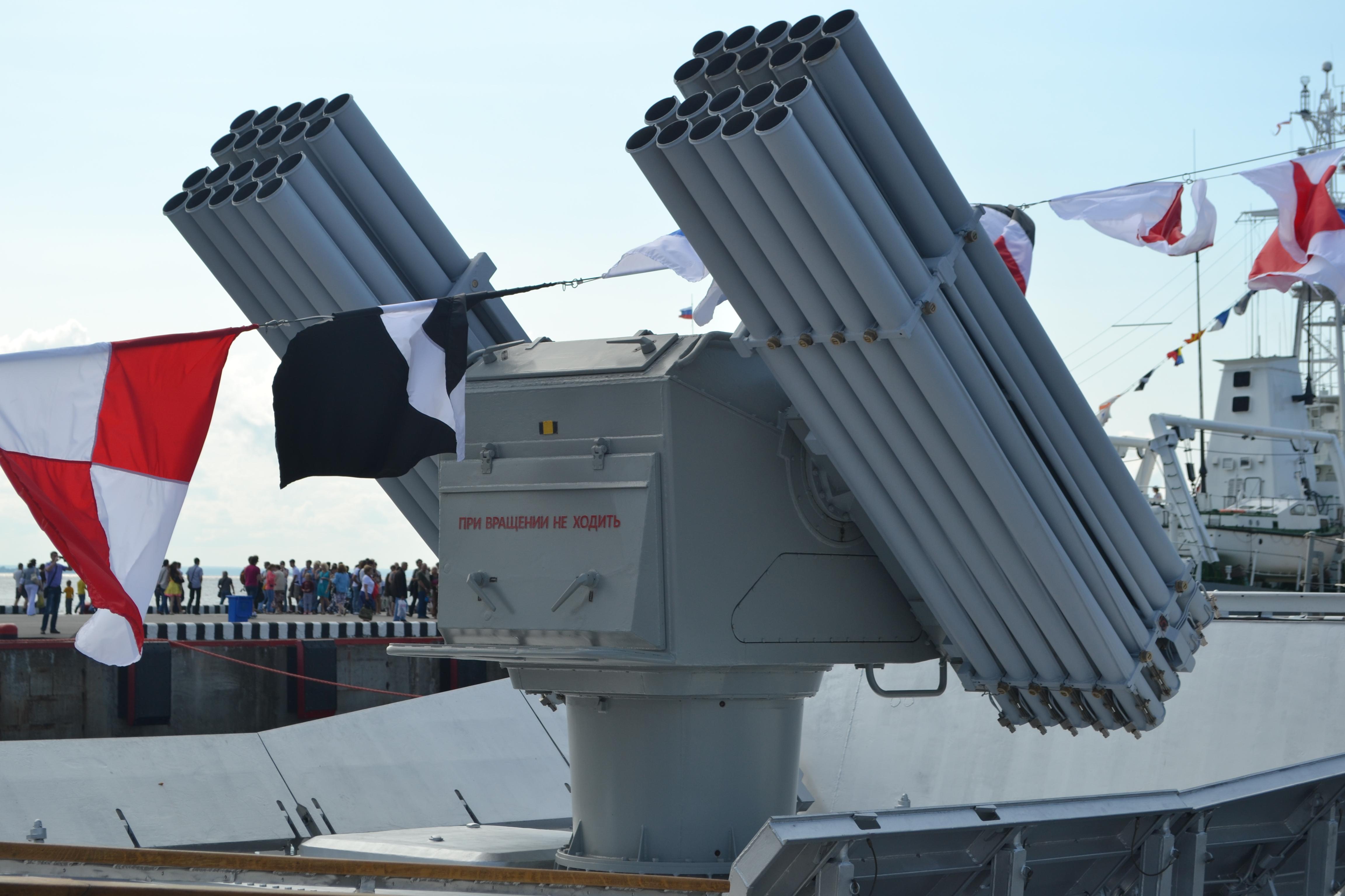 Die Marineversion A-215 „Grad-M“ des Mehrfachraketenwerfers BM-21 „Grad.“